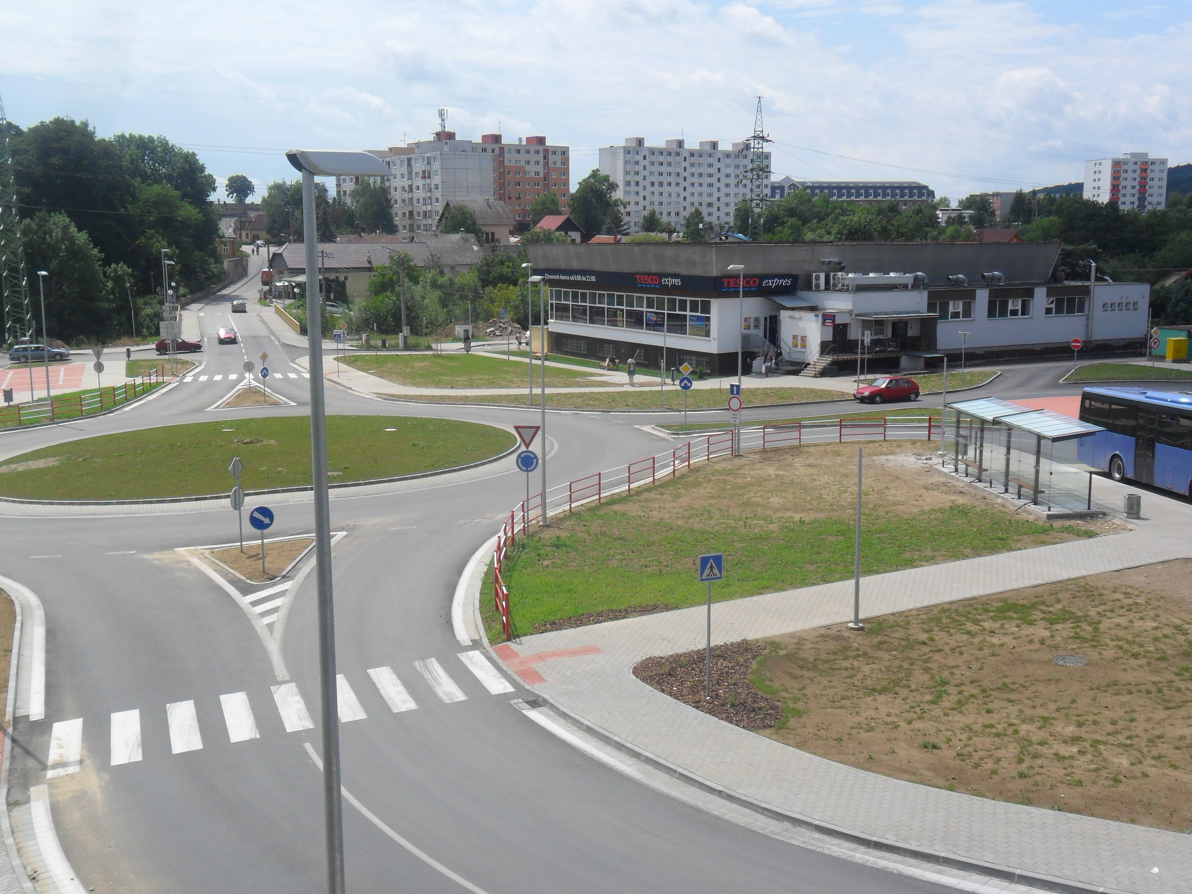 Námestie Lednické Rovne